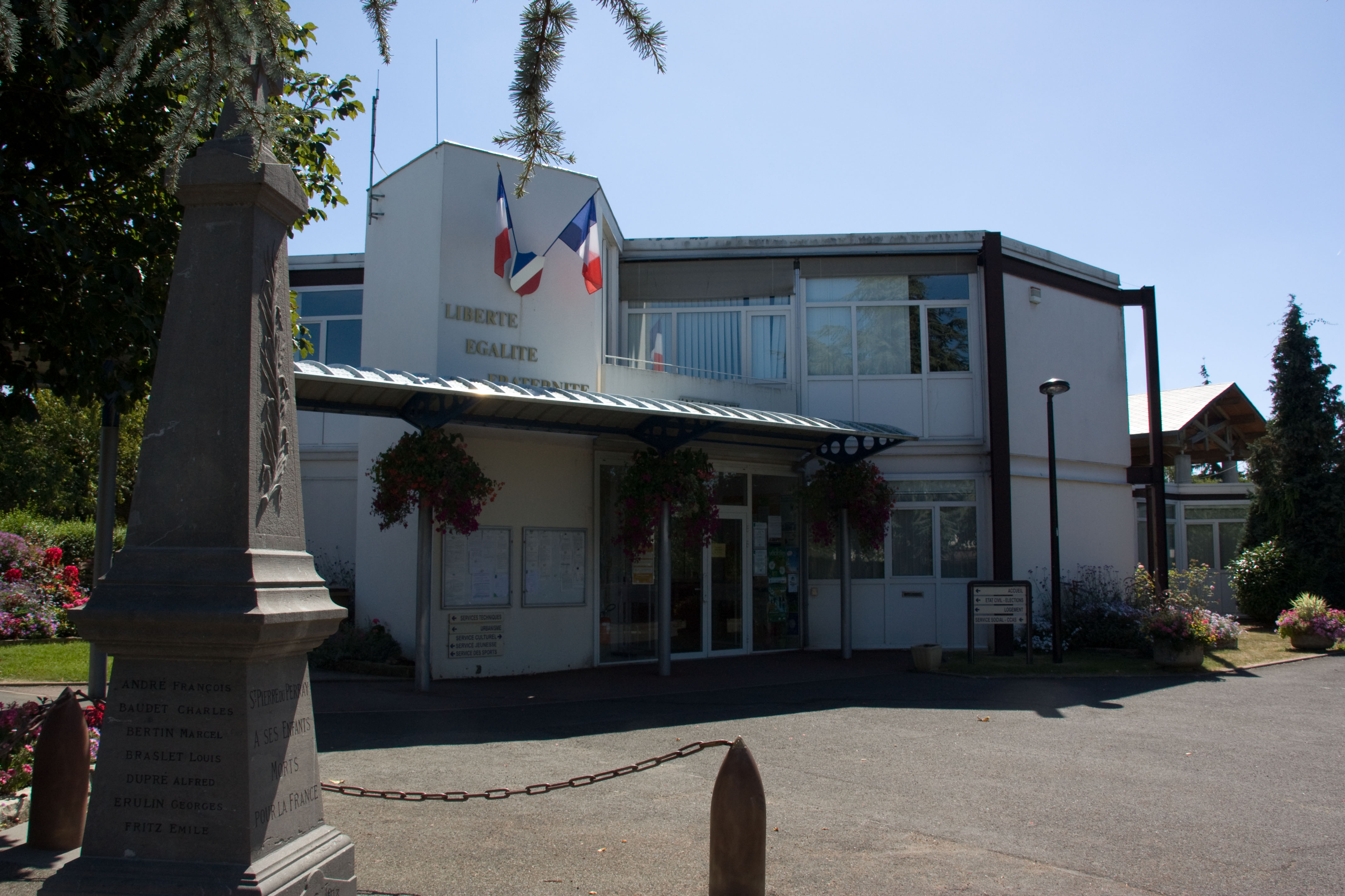 Mairie de Saint-Pierre-du-Perray, Saint-Pierre-du-Perray, Essonne, France